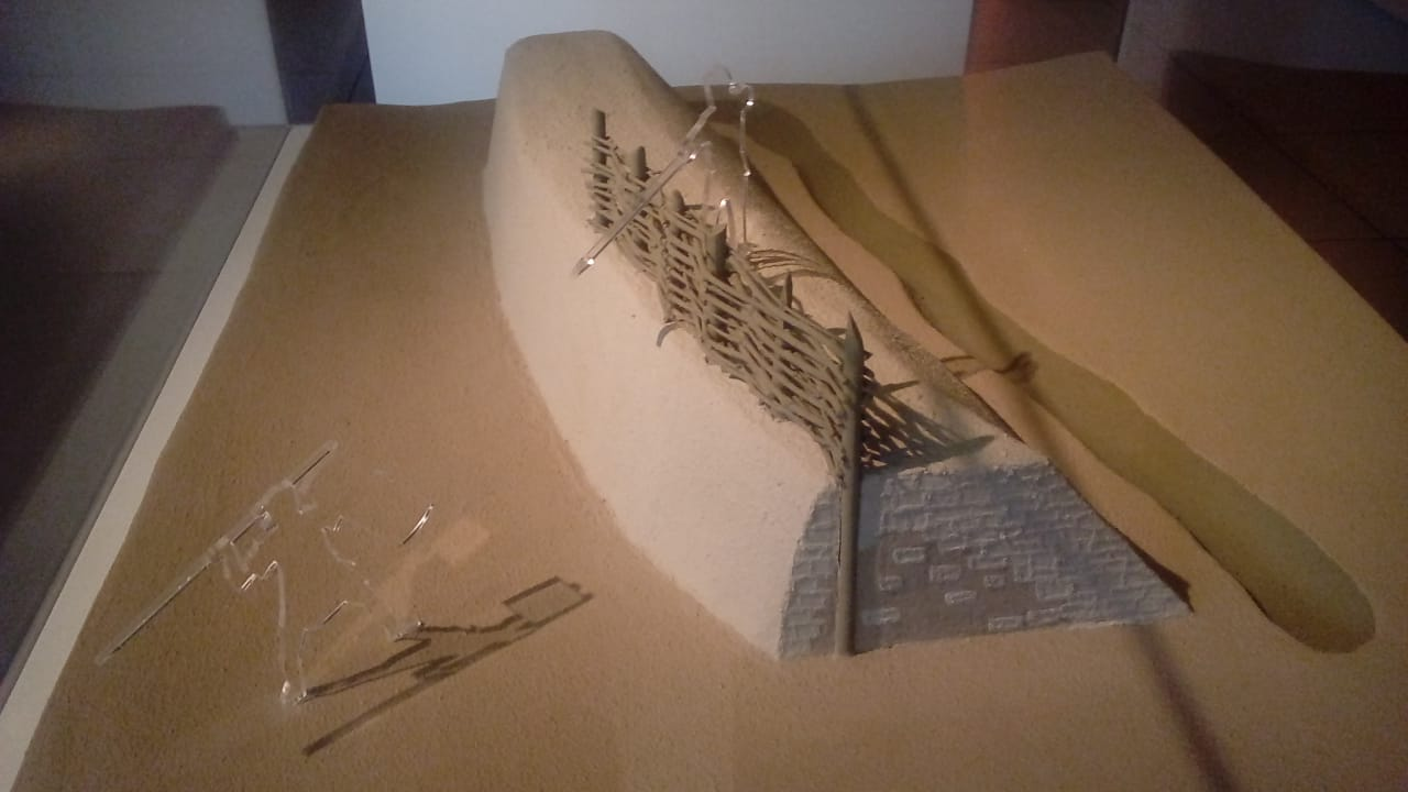 Kalkrieser Germanenwall Modell